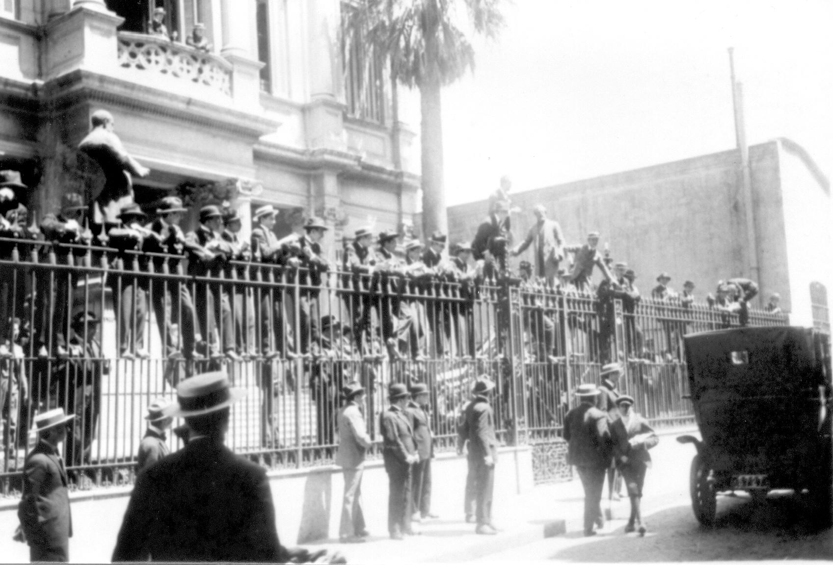 Vista del edificio de la Facultad de Derecho de la UBA en Moreno 350, hoy Museo Etnográfico. Durante la toma estudiantil por la Reforma Universitaria que empezó en Córdoba en 1918.